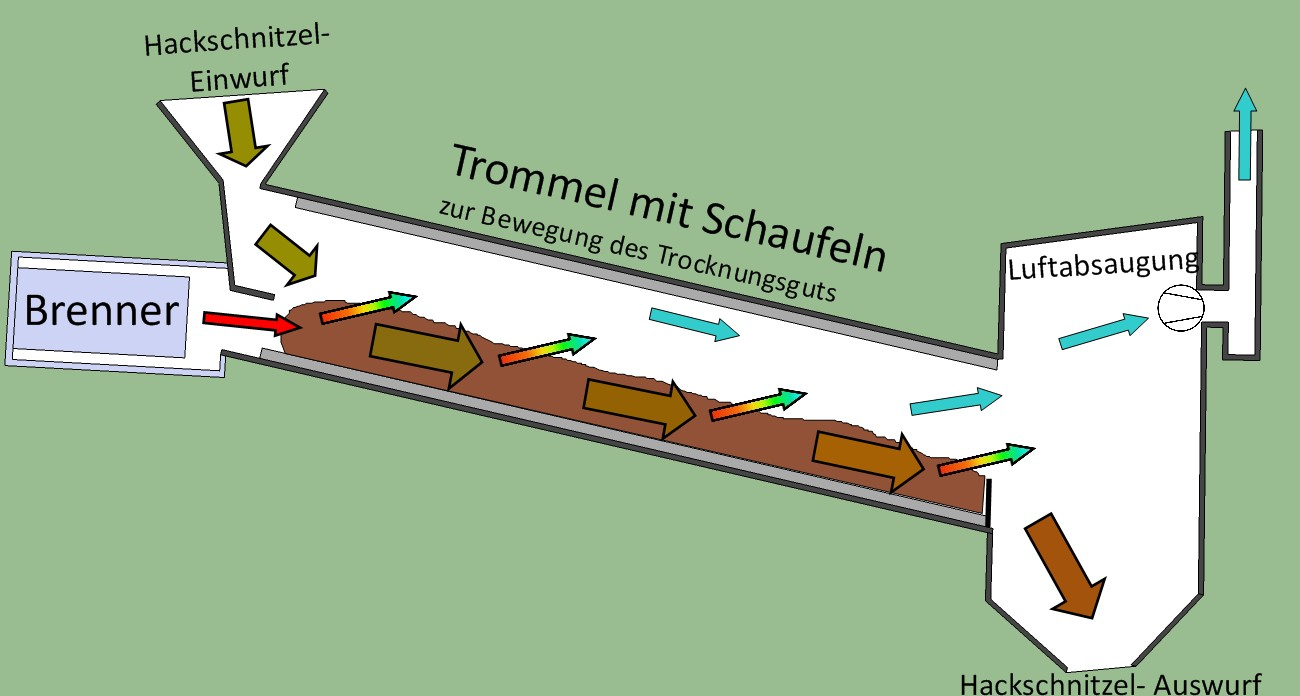 Trommeltrockner